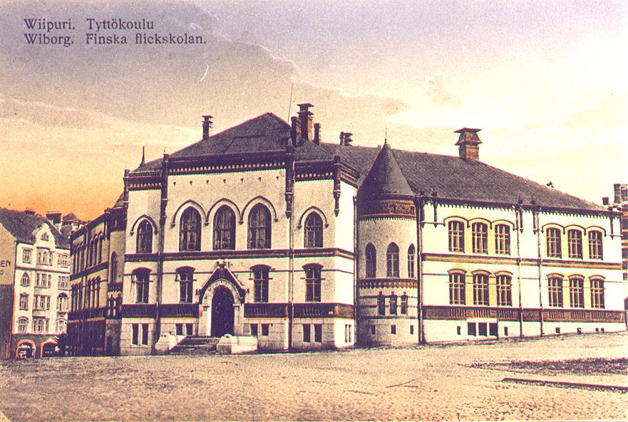 Почтовая открытка с изображением финской женской гимназии в Выборге